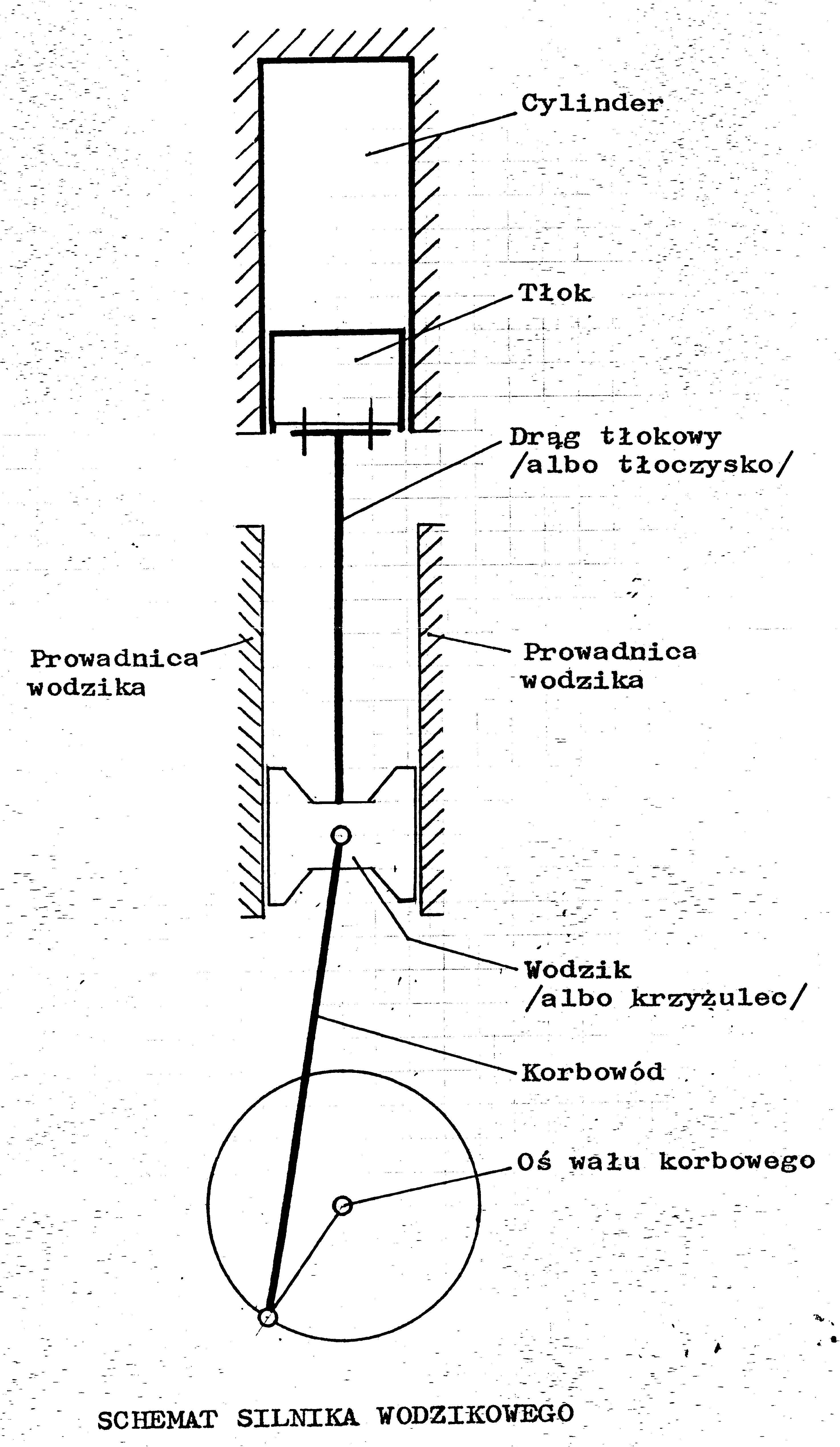 Schemai ideowy silnika wodzikowego